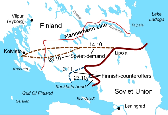 蘇芬邊境談判圖